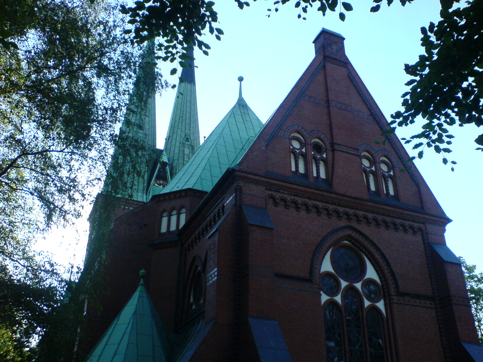 Bildbeschreibung: St. Petri Altona Portal Fotograf/Zeichner: PodracerHH 23:50, 10. Jul 2006 (CEST) Datum: 07.2006 Sonstiges: ...